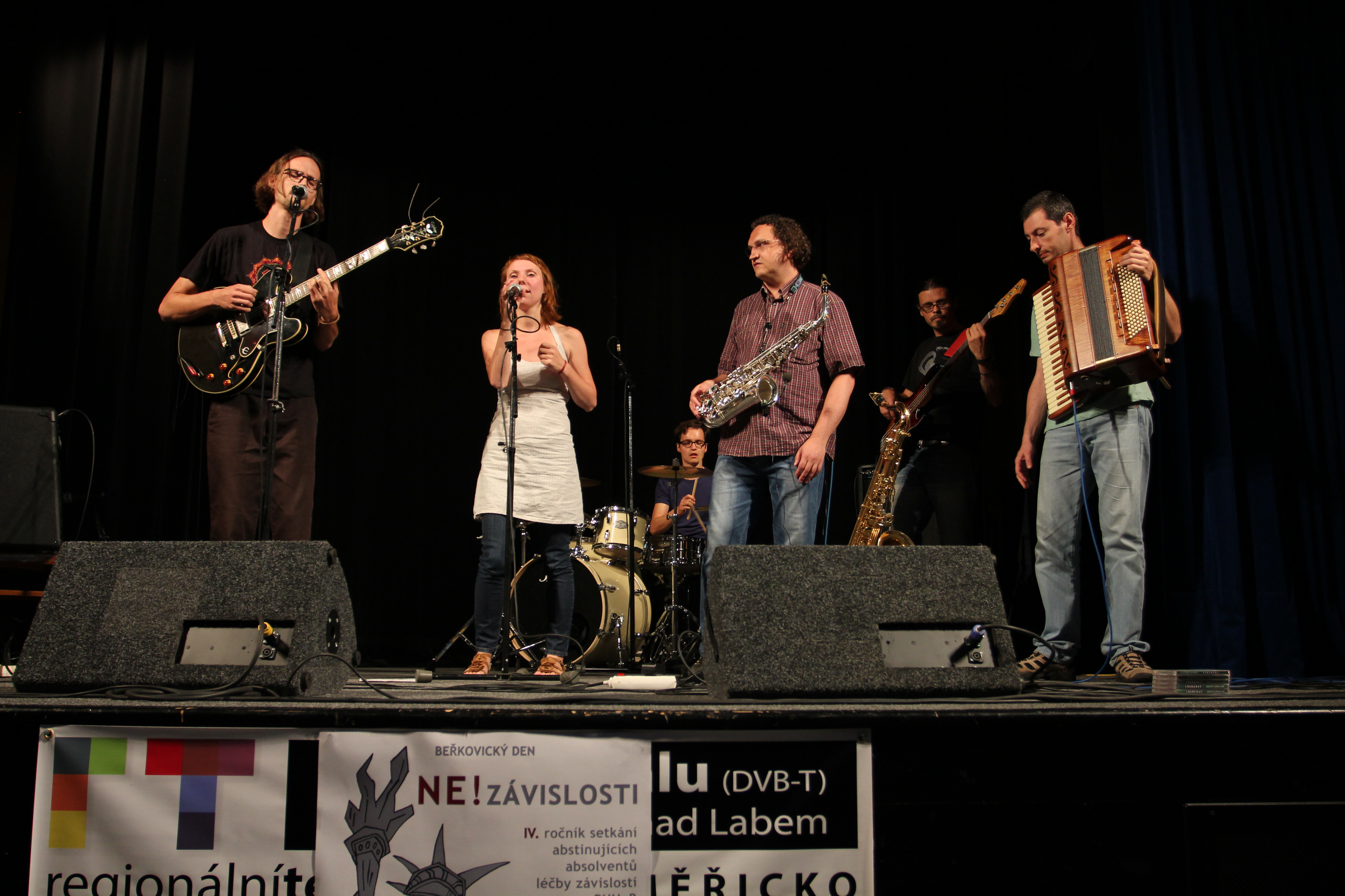 Spolceni